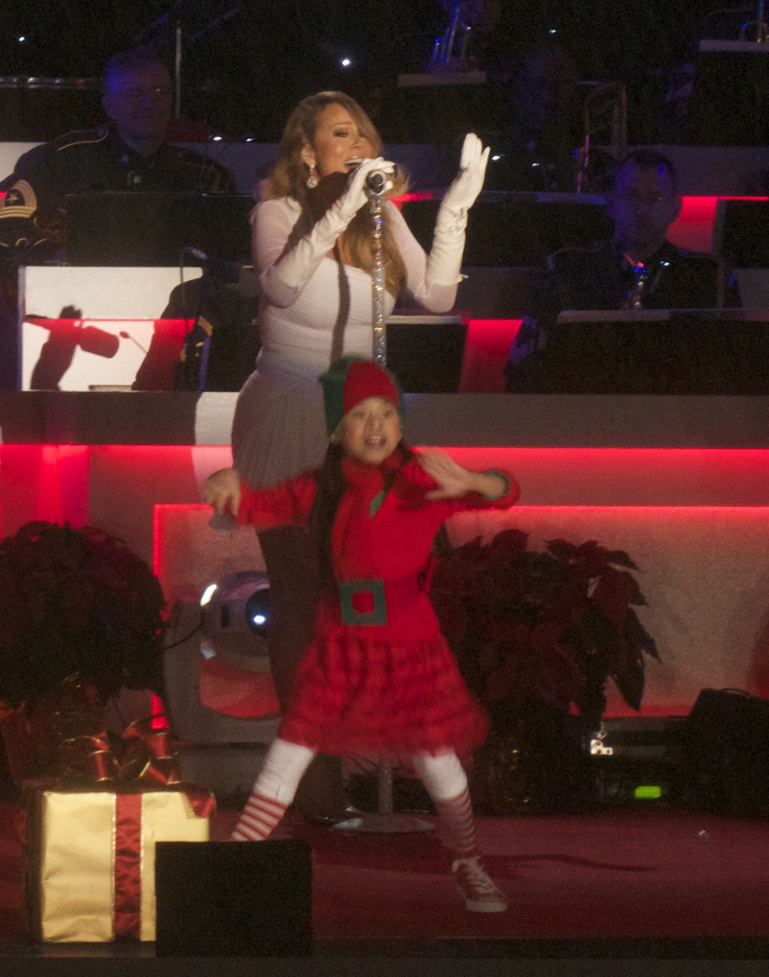 Mariah Carey durante su mini-residencia navideña de conciertos en Nueva York (Diciembre de 2013).